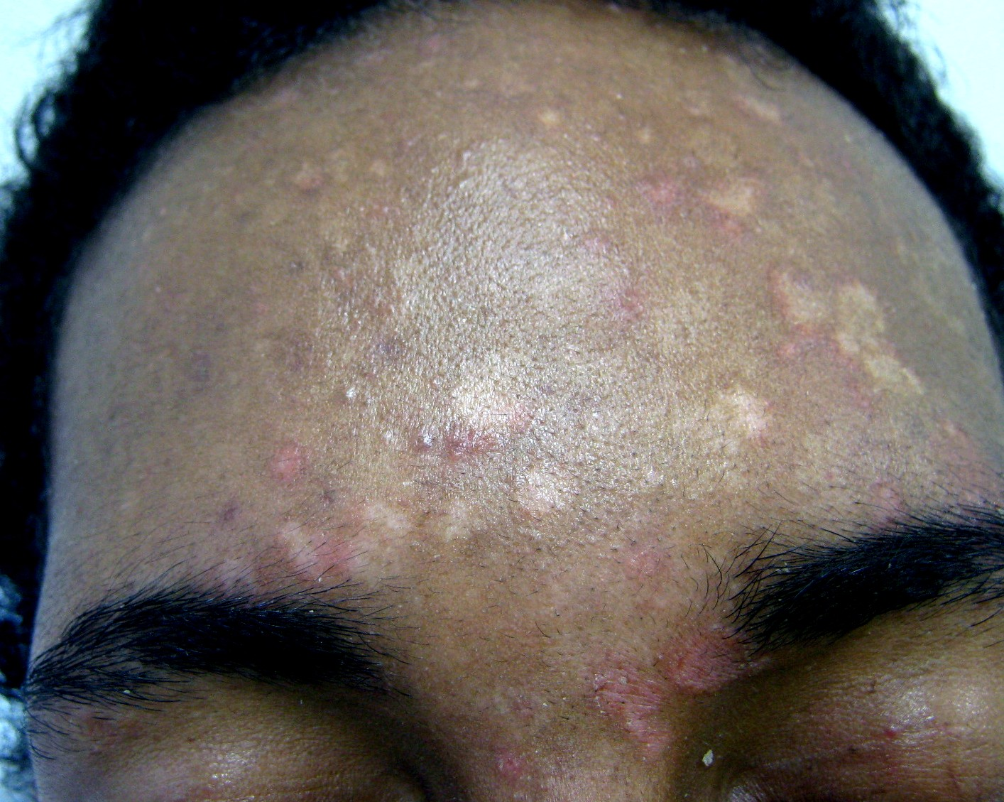 Pityriasis versicolor / Tinea versicolor (mycose superficielle à Malassezia furfur) sur peau noire : nombreuses lésions de type macules arrondies +/- confluentes, d'âges différents sur le front, certaines sont actives inflammatoires, érythémateuses et finement squameuses, d'autres plus anciennes sont inactives et achromiques, particulièrement inesthétiques.